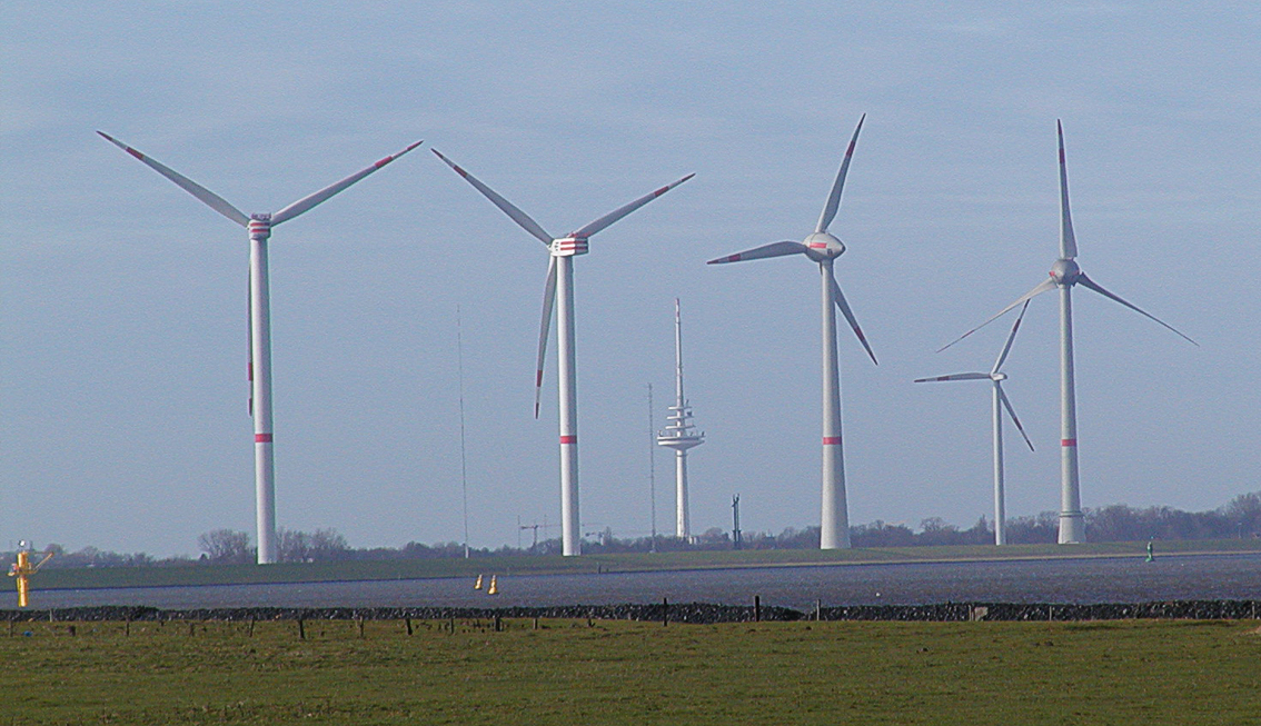 Die Langzeitmessstelle 3 (LZ3) mit ihren Warnbojen und der grünen Fahrrinnengrenzboje (ganz rechts), den Windkraftanlagen sowie den Fernsehturm